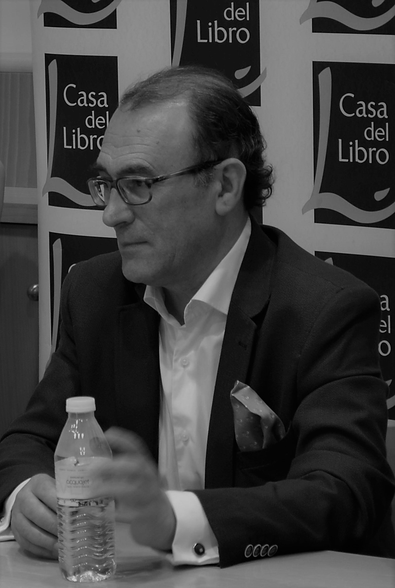 José Carlos García Rodríguez, periodista y escritor, presentando una de sus obras en La Casa del Libro de Sevilla.